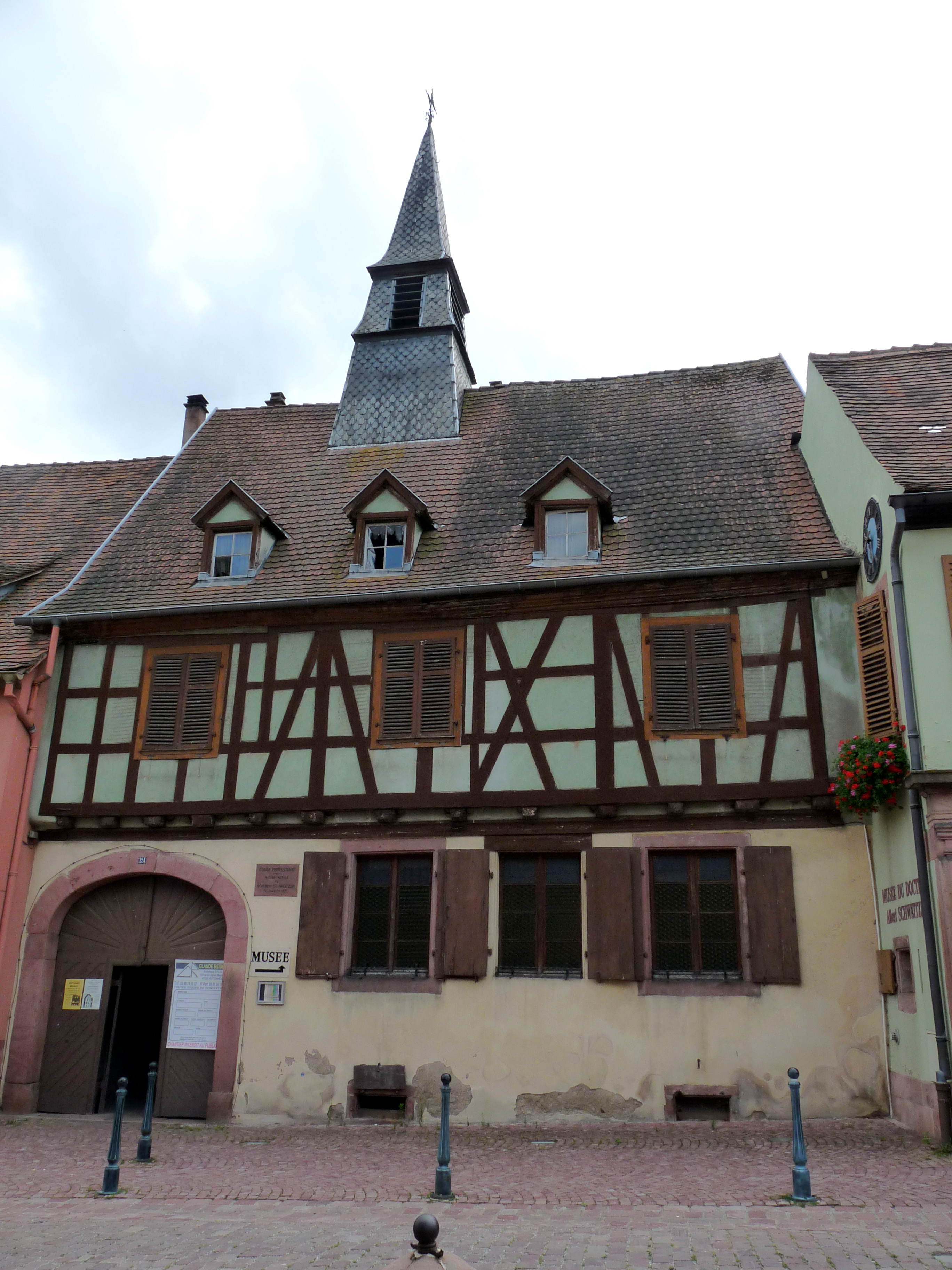 Maison natale du docteur Albert Schweitzer à Kaysersberg (Haut-Rhin). Fait aujourd'hui partie du musée